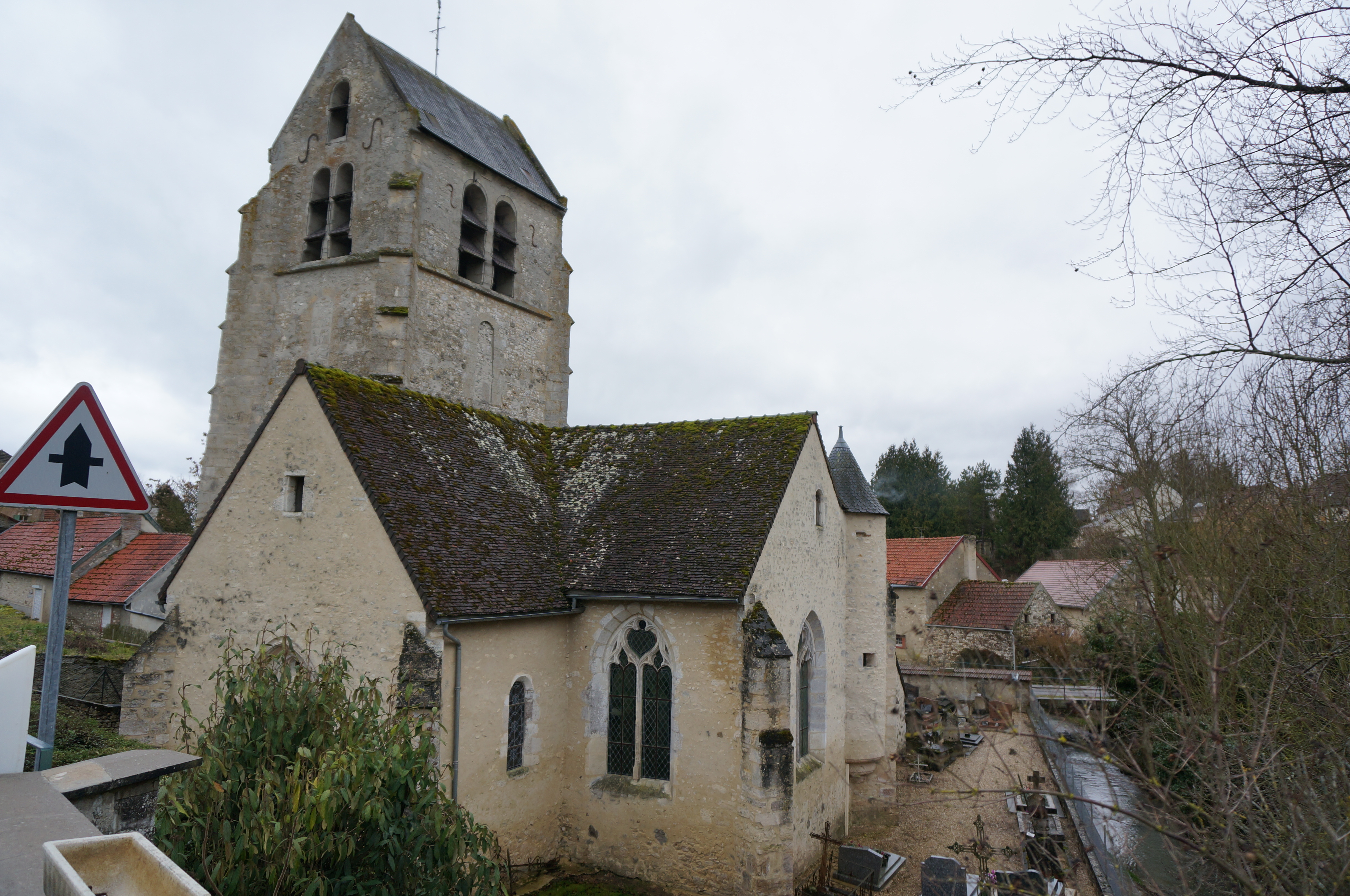 Villers-Agron-Aiguizy, Église cimetière.